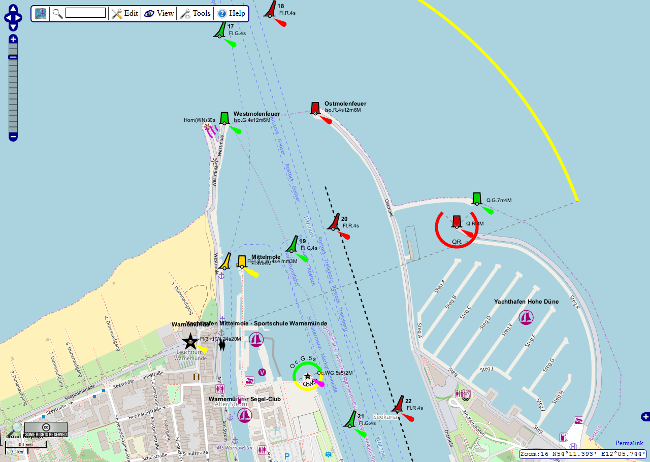 OpenSeaMap - Kartenausschnitt Musterhafen "Warnemünde"